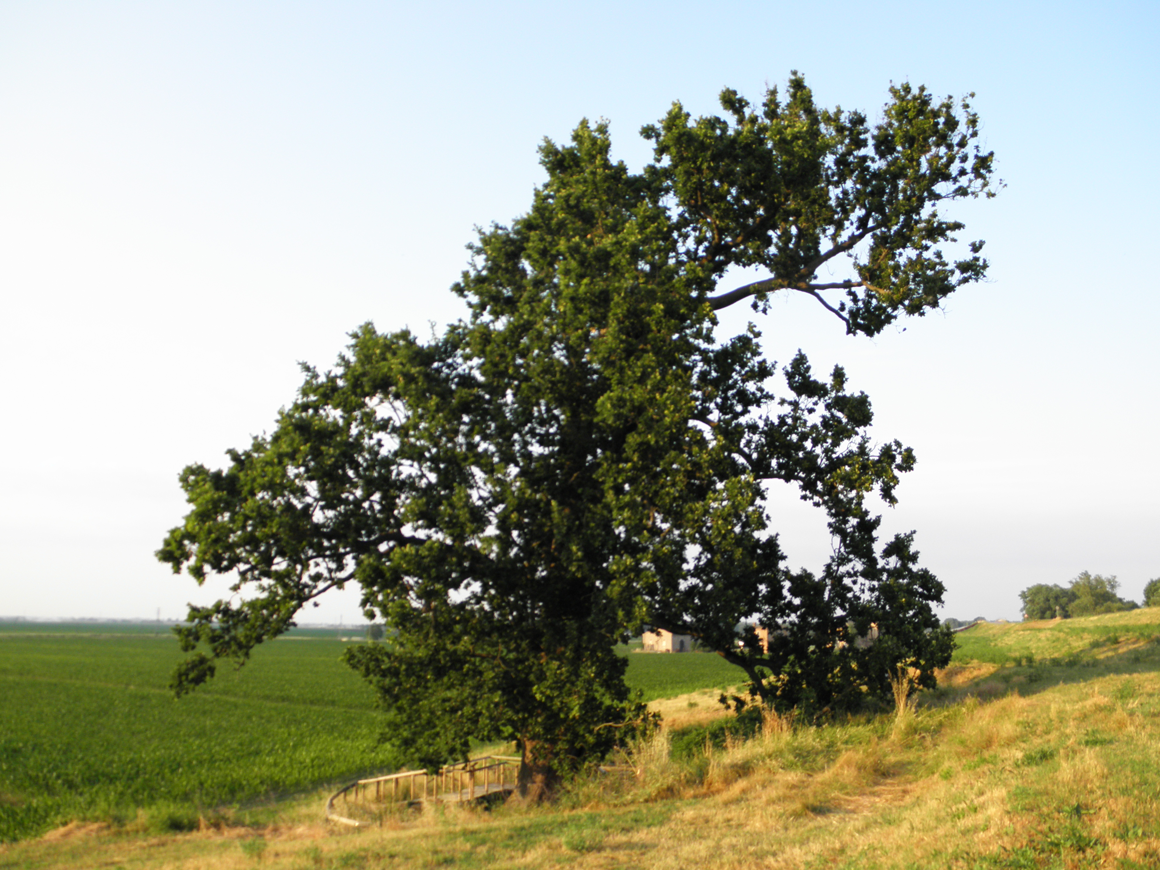 Ariano nel Polesine: la quercia secolare detta popolarmente "la rovra" (il rovere).